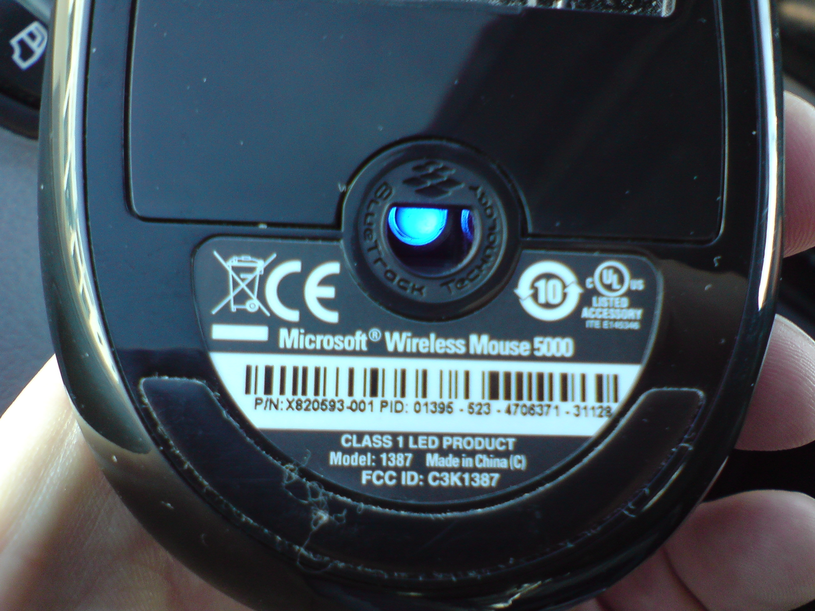 Microsoft Wireless Mouse 5000-3 pohled zdola